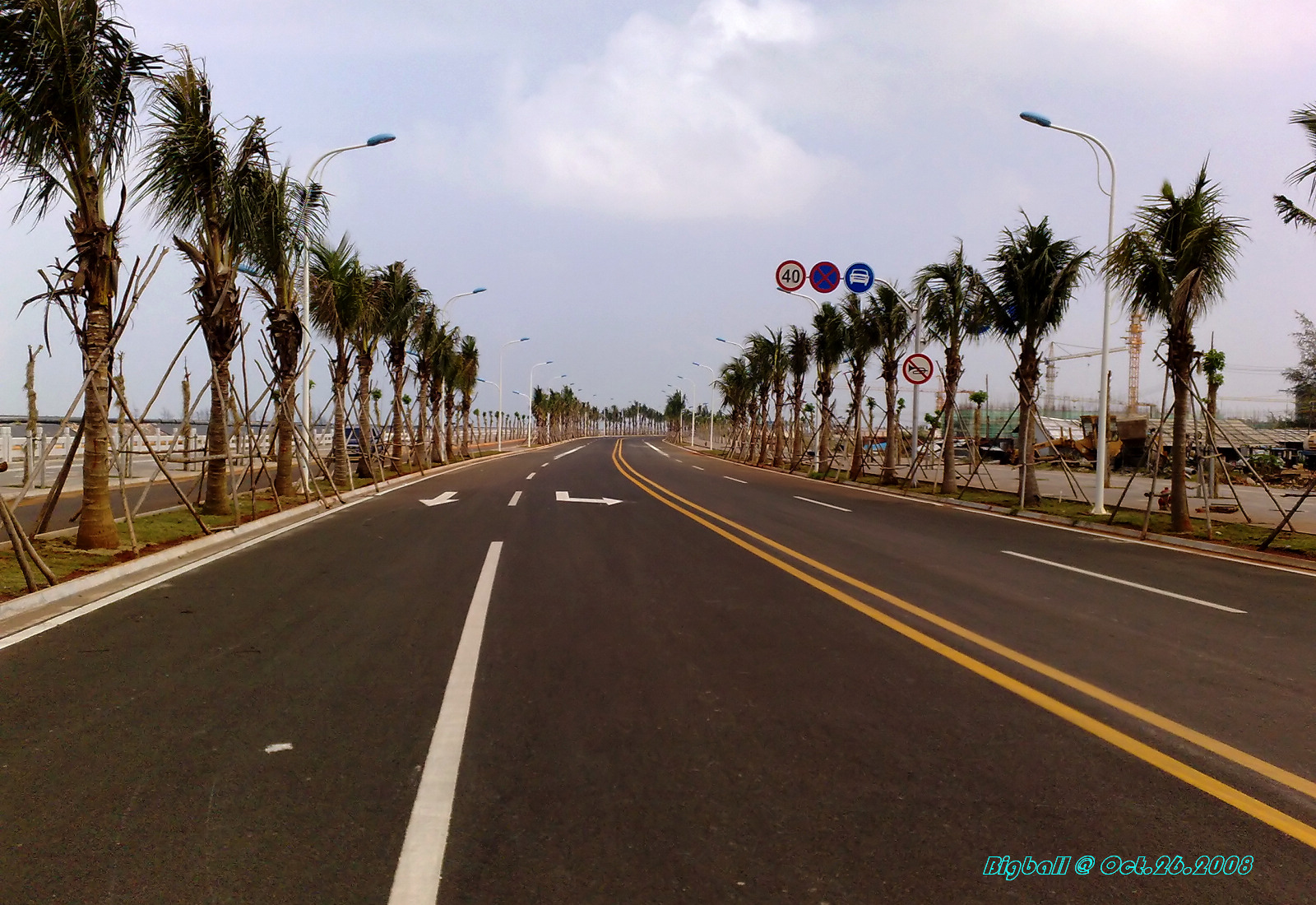 海甸岛环岛公路-By Bigball